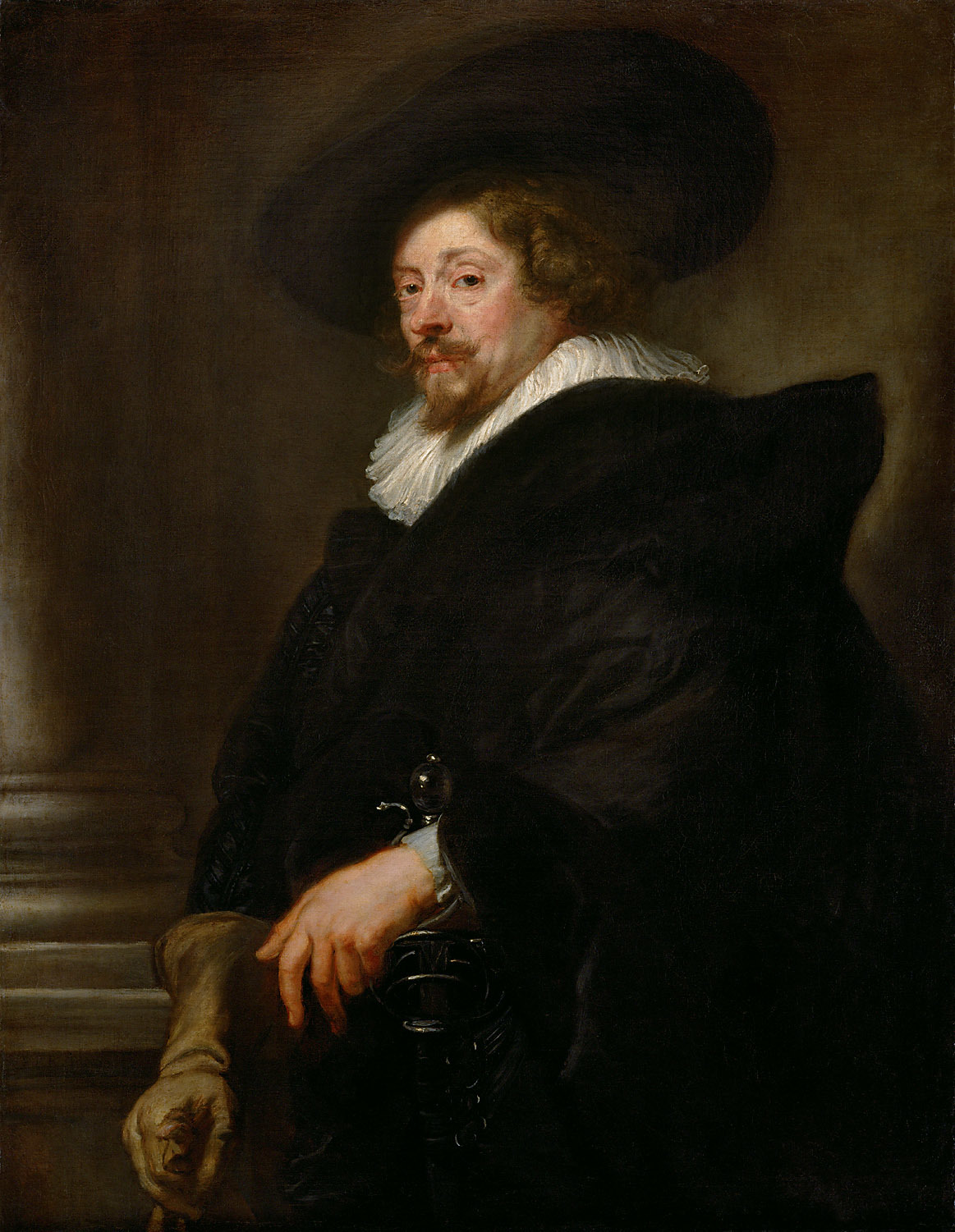 "Self-Portrait" (1638/1640); Kunsthistorisches Museum, Vienna